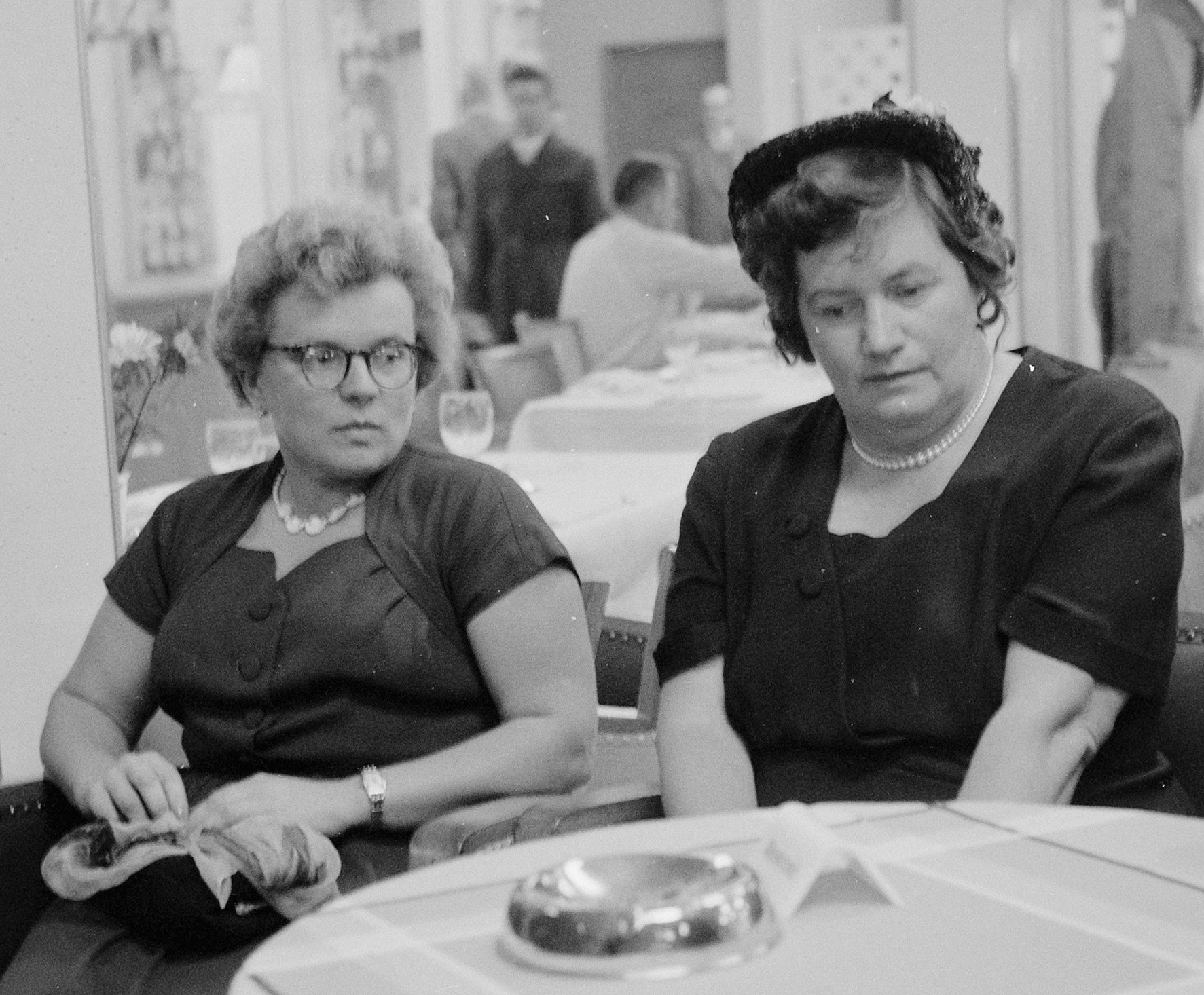 Aankomst deelneemsters landenschaaktoernooi te Emmen. Olga Rubtsova (wereldkampioene) rechts, Kira Zvorykina (links)